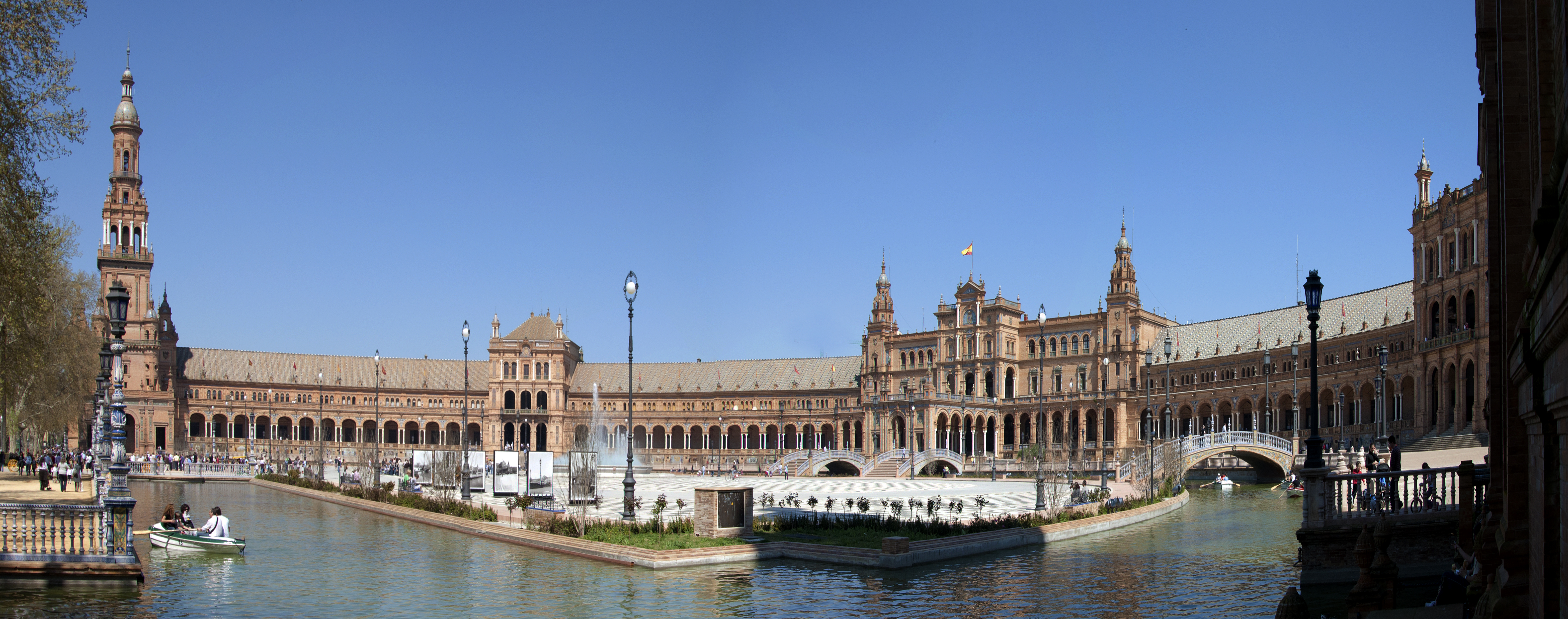 Plaza de España in Sevilla